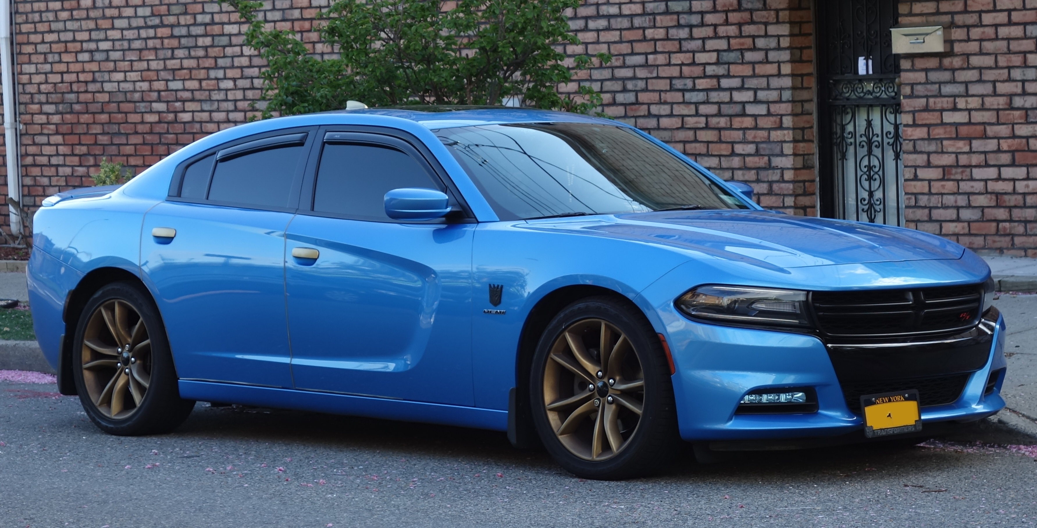 Dodge Charger (2015)